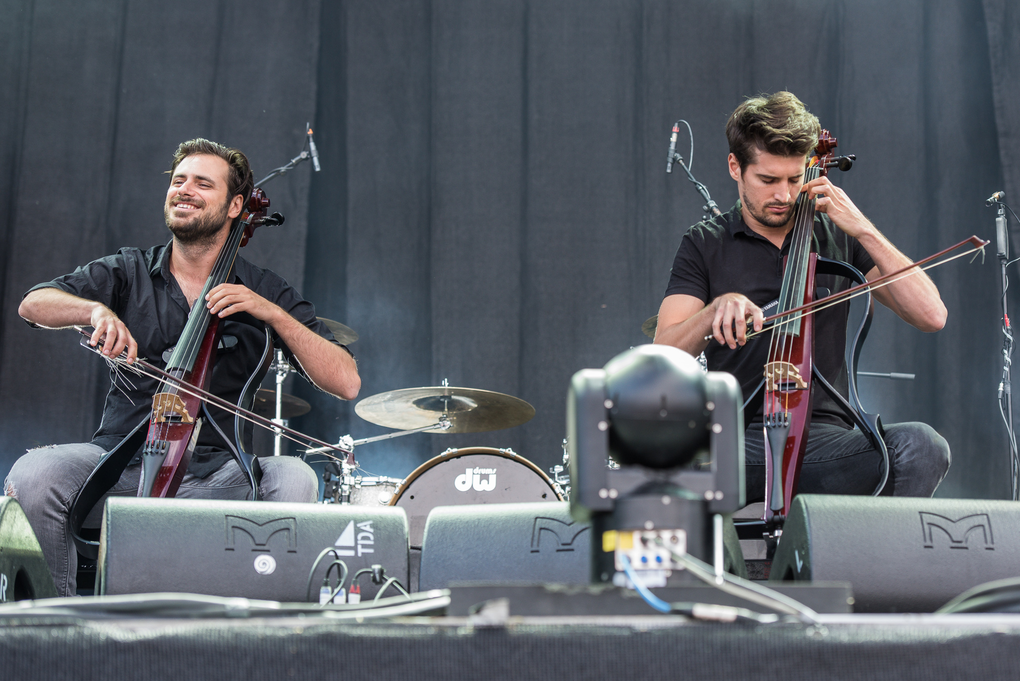 2Cellos,ARGO-Konzerte,Beck's Park Stage,Konzert,Livekonzert,Livemusik,Luka Šulic,Musik,RiP,Rock im Park 2017,Stjepan Hauser